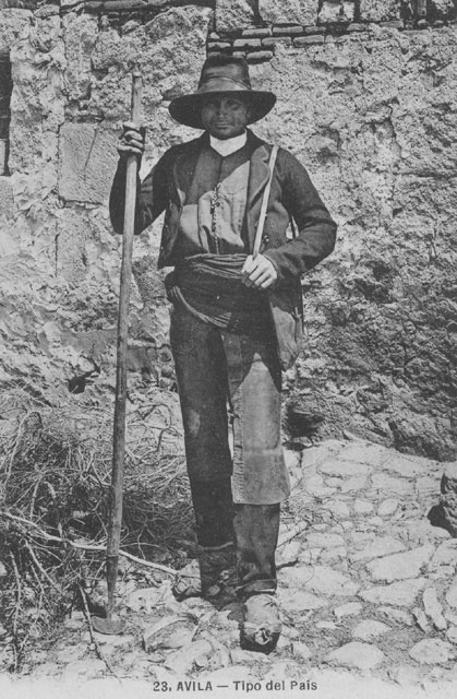 Tipo del país - Ávila - Ed. Lucas Martín. Ávila - Postal 90 x 130 B/N